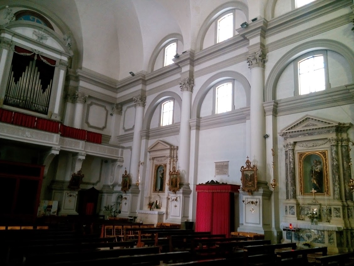 Particolare interno